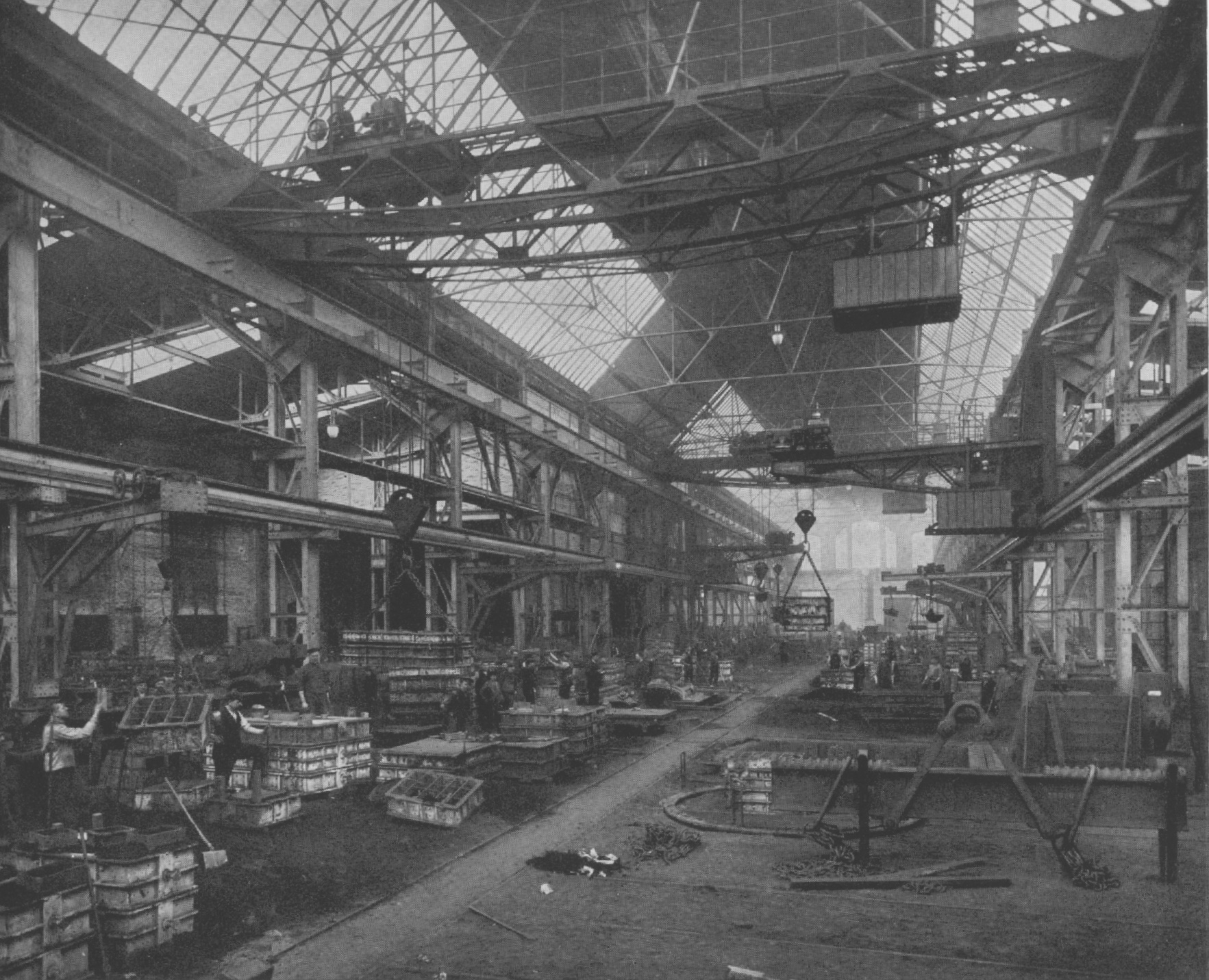 Innenansicht der Eisengießerei der Maschienenfabrik Wolf in Magdeburg-Salbke